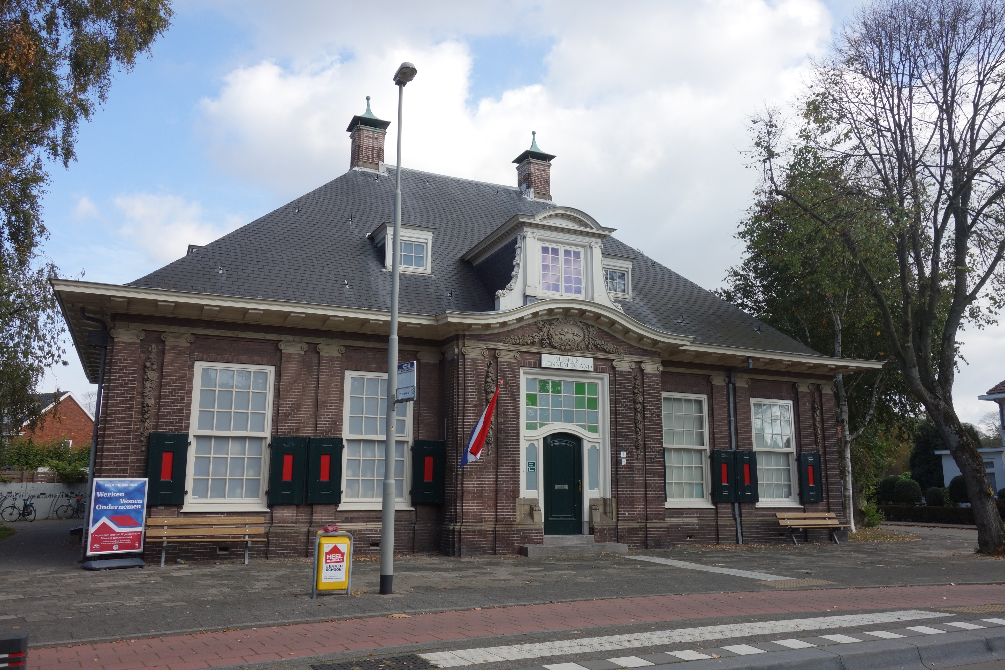 Voormalige raadhuis van Wijk aan Zee en Duin aan het Westerhoutplein 1 in Beverwijk. Het plein waar het pand aan staat was toen onderdeel van Wijk aan Duin.